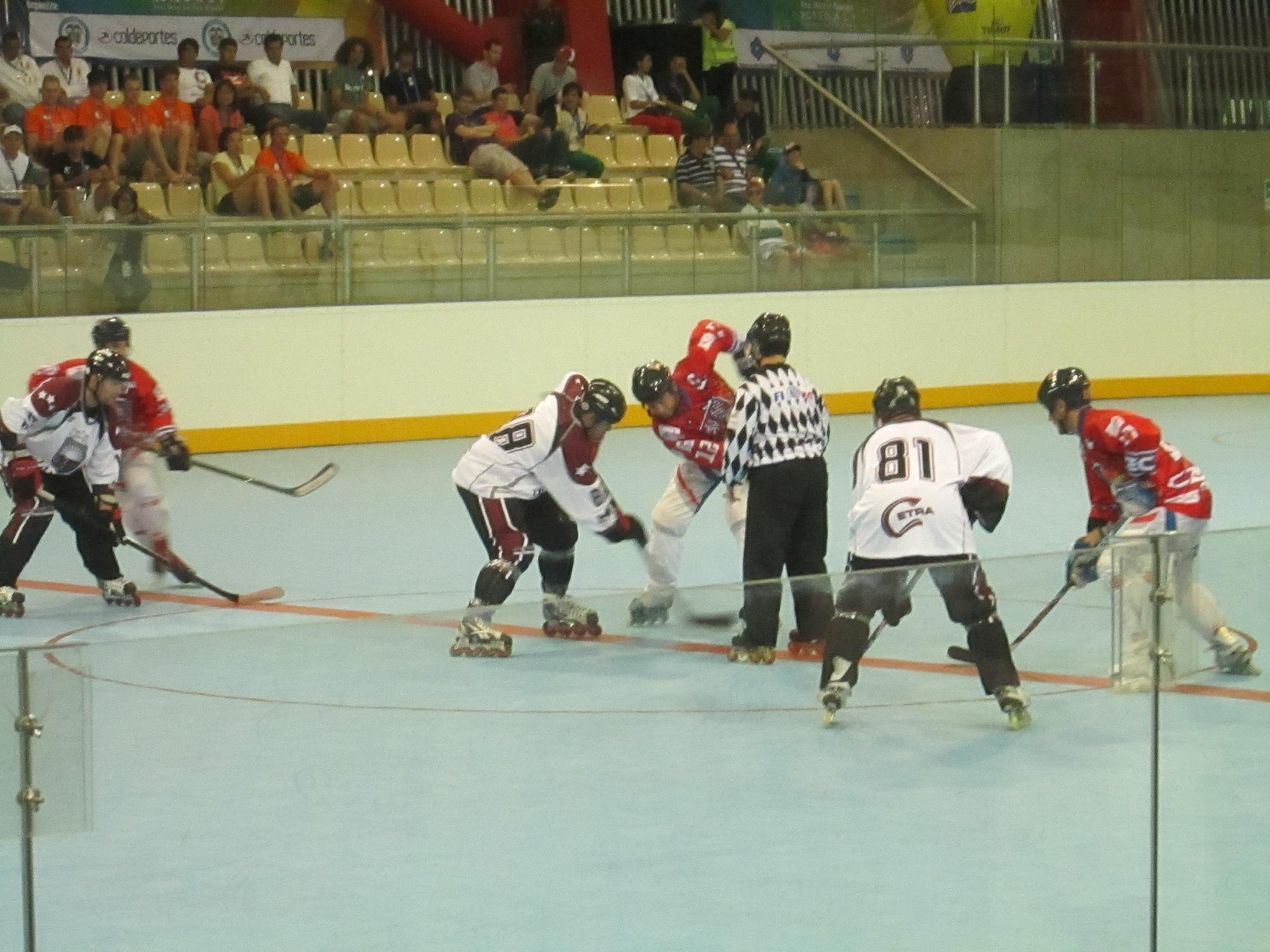 Juego entre Letonia y República Checa - World Games 2013